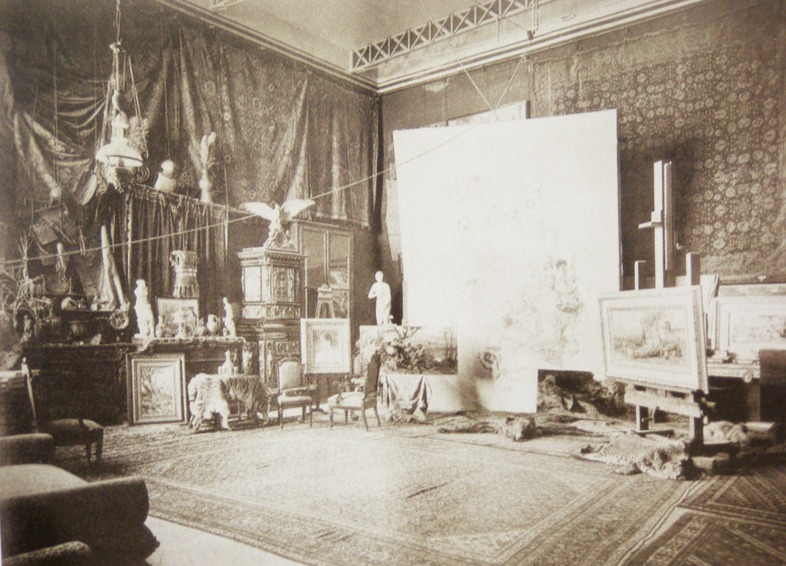 Интерьер мастерской Семирадского в Риме, в доме на виа Гаета, 1. Около 1896 года